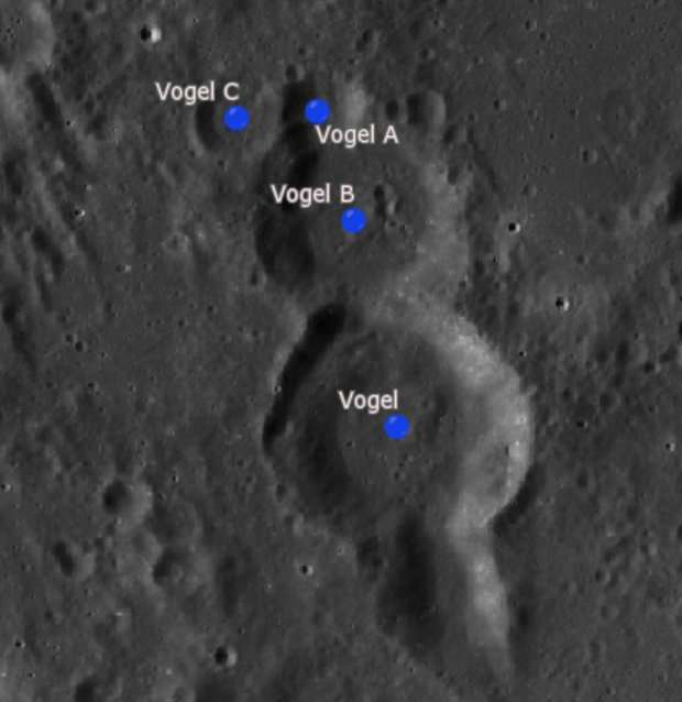 Cráter lunar Vogel. Cráteres satélite. (Imagen LRO)